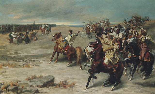 Fantasia